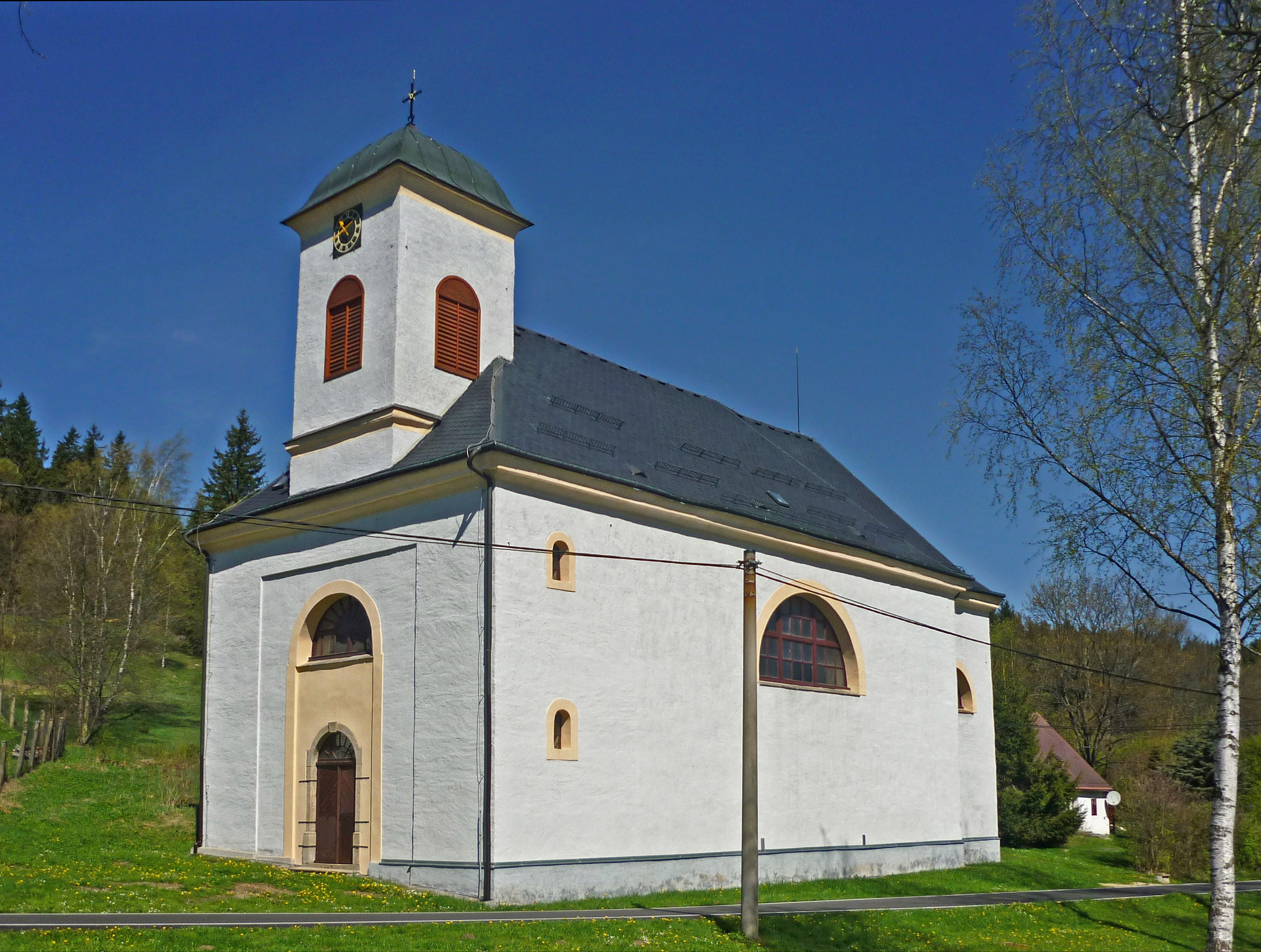 Christophorus-Kirche in Christophhammer (Kryštofovy Hamry)